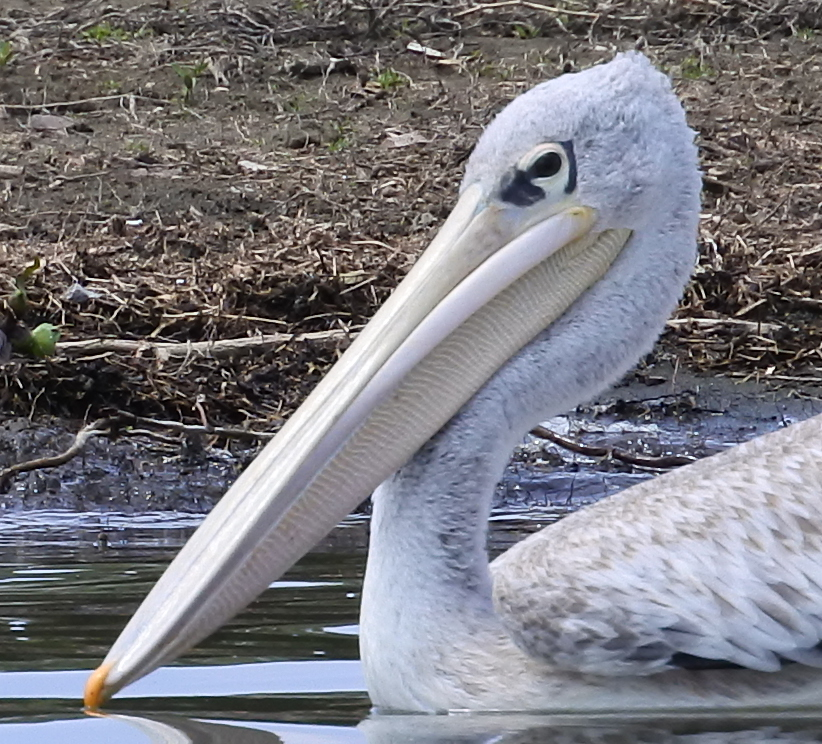 Lake Naivasha, Kenya